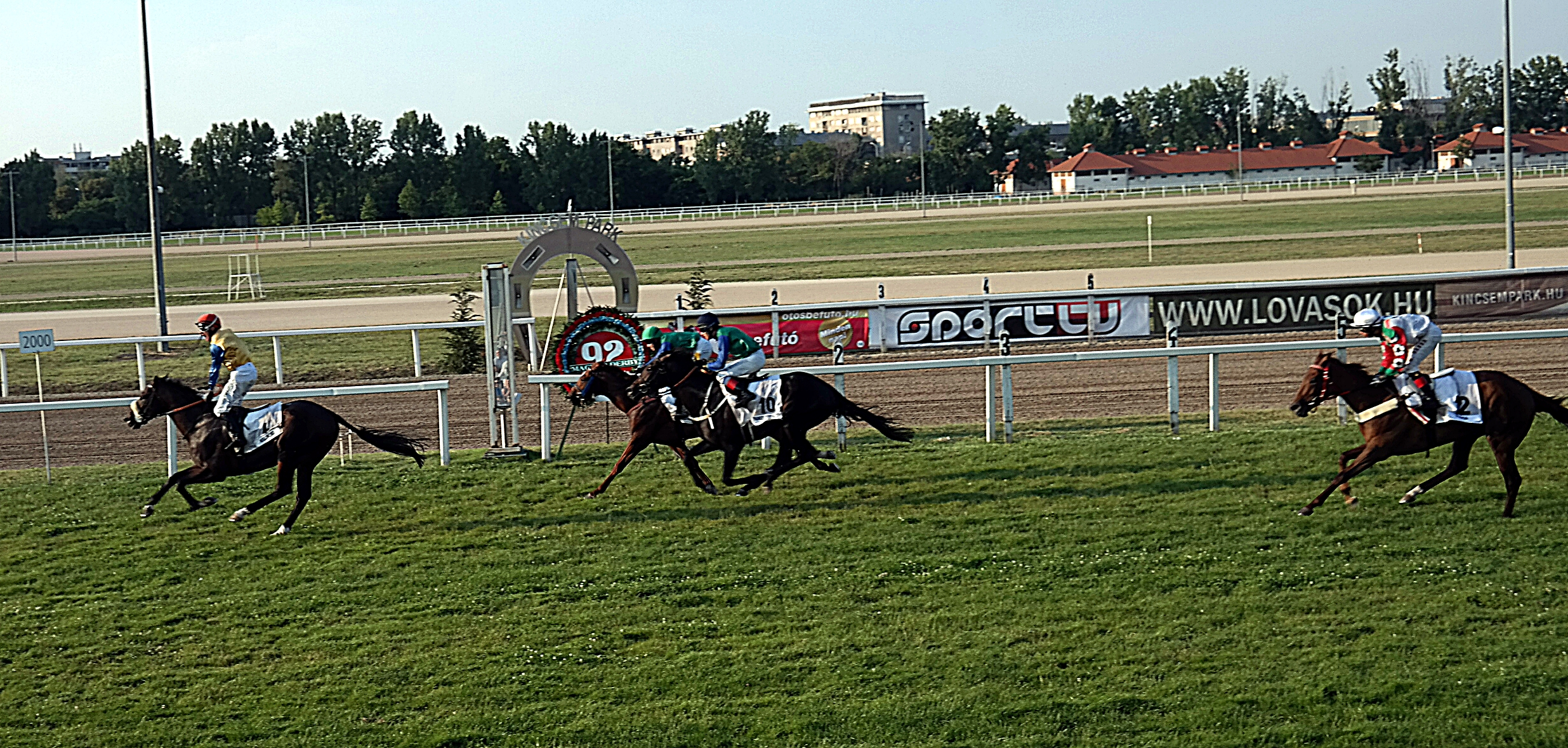 A 92. Magyar Derby befutója. Kilword már a célban. Thunder Teddington és Red Hot Calypso fej-fej mellett a dobogós helyen. Negyedik a legjobb kanca: Panda. Kincsem Park.